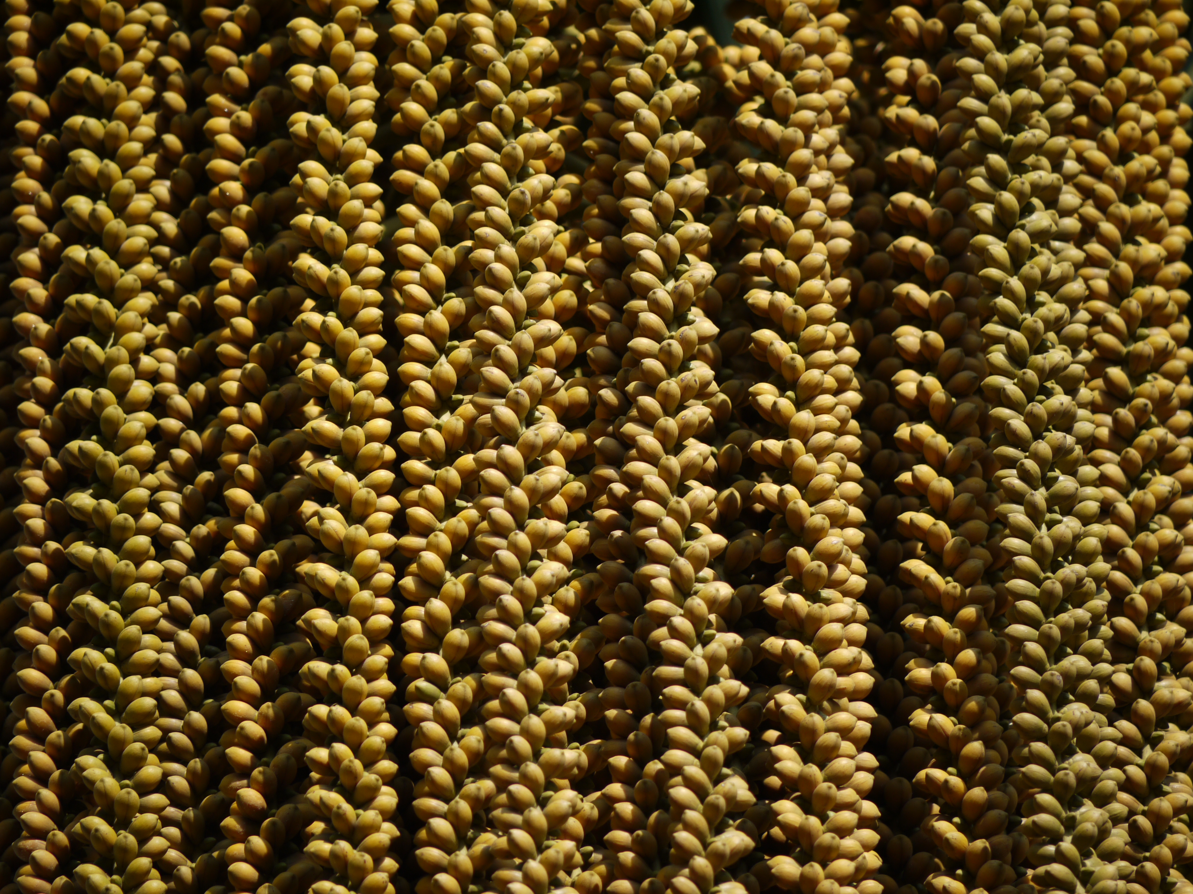 Arecaceae (palm family) » Caryota urens kair-ee-OH-tuh or kar-RY-oh-tuh -- from the Greek karyon (nut) UR-ens -- meaning, burning or stinging commonly known as: fishtail palm, jaggery palm, toddy palm, wine palm • Hindi: बन खजूर ban-khajur, माड़ी mari • Kannada: bagani, baini, indu • Malayalam: ചൂണ്ടപ്പന cuuntappana • Marathi: भेरली माड bherli-maad, सुरमाड sur-maad • Sanskrit: श्रीताल sritalah • Tamil: கூந்தற்பனை kuntaypanai, திப்பிலிப்பனை tippili-p-panai • Telugu: జిలుగు jeelugu Origin: India, Myanmar, Sri Lanka References: Flowers of India • Top Tropicals • Dave's Garden